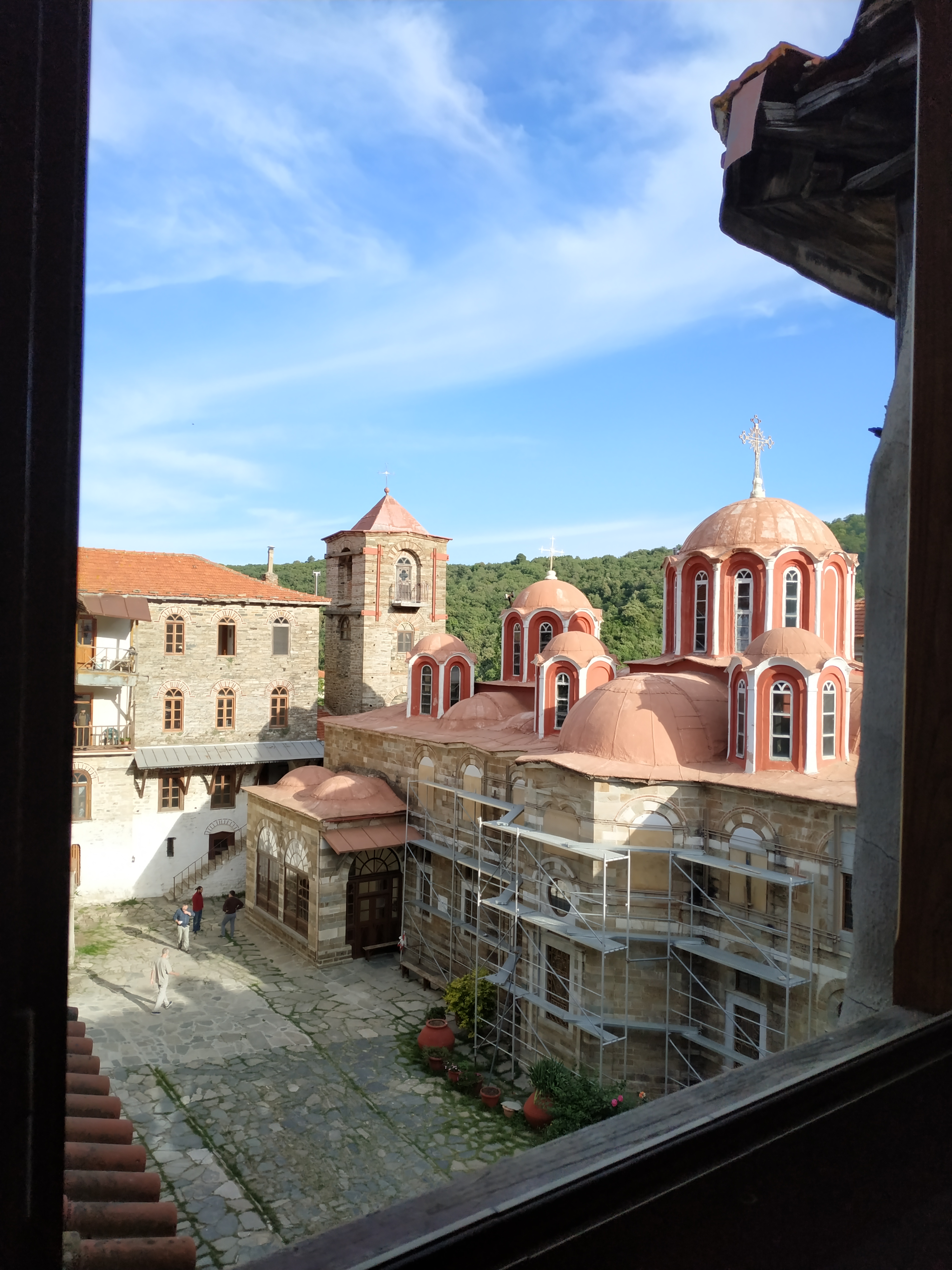 Монастир Костамоніт